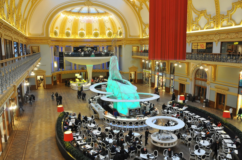 De Stadsfeestzaal is een neoclassicistisch gebouw uit 1908 van stadsbouwmeester Alexis Van Mechelen. Lange tijd was het ��n van de bekendste zalen in Antwerpen dat onder meer onderdak bood aan tentoonstellingen en verschillende feesten. In september 2000 vernielde een hevige brand bijna heel het gebouw en bleef er amper nog iets van over. Op 25 oktober 2007 opende de compleet gerenoveerde Stadsfeestzaal opnieuw zijn deuren voor het grote publiek, dit keer als luxueus shoppingcenter. Een van de blikvangers na de renovatie is de zwevende champagnebar van Laurent-Perrier (achterin op de foto). Bron: Wikipedia.